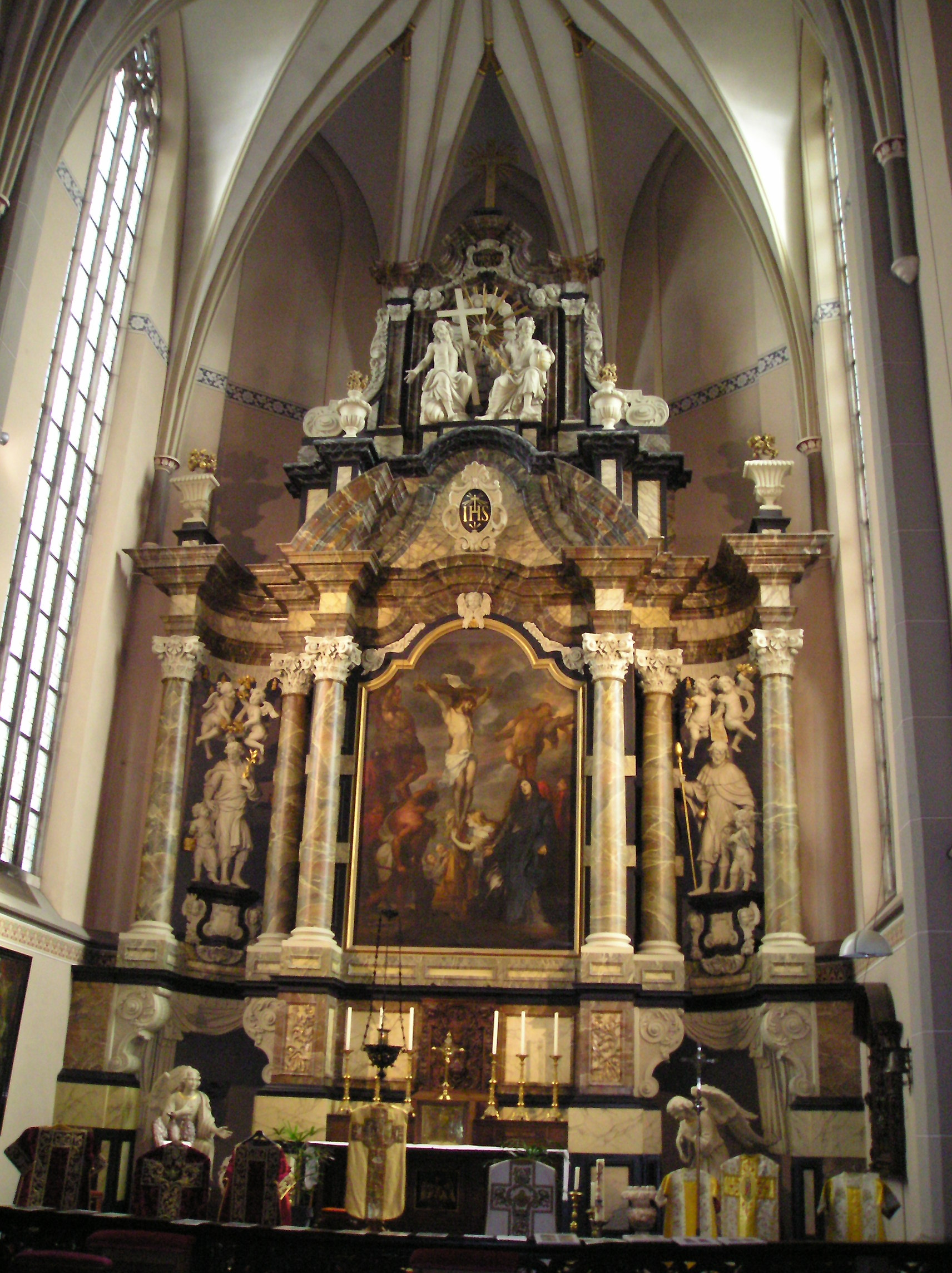 Sint Elisabethskerk Grave - gewelven - priesterkoor 1